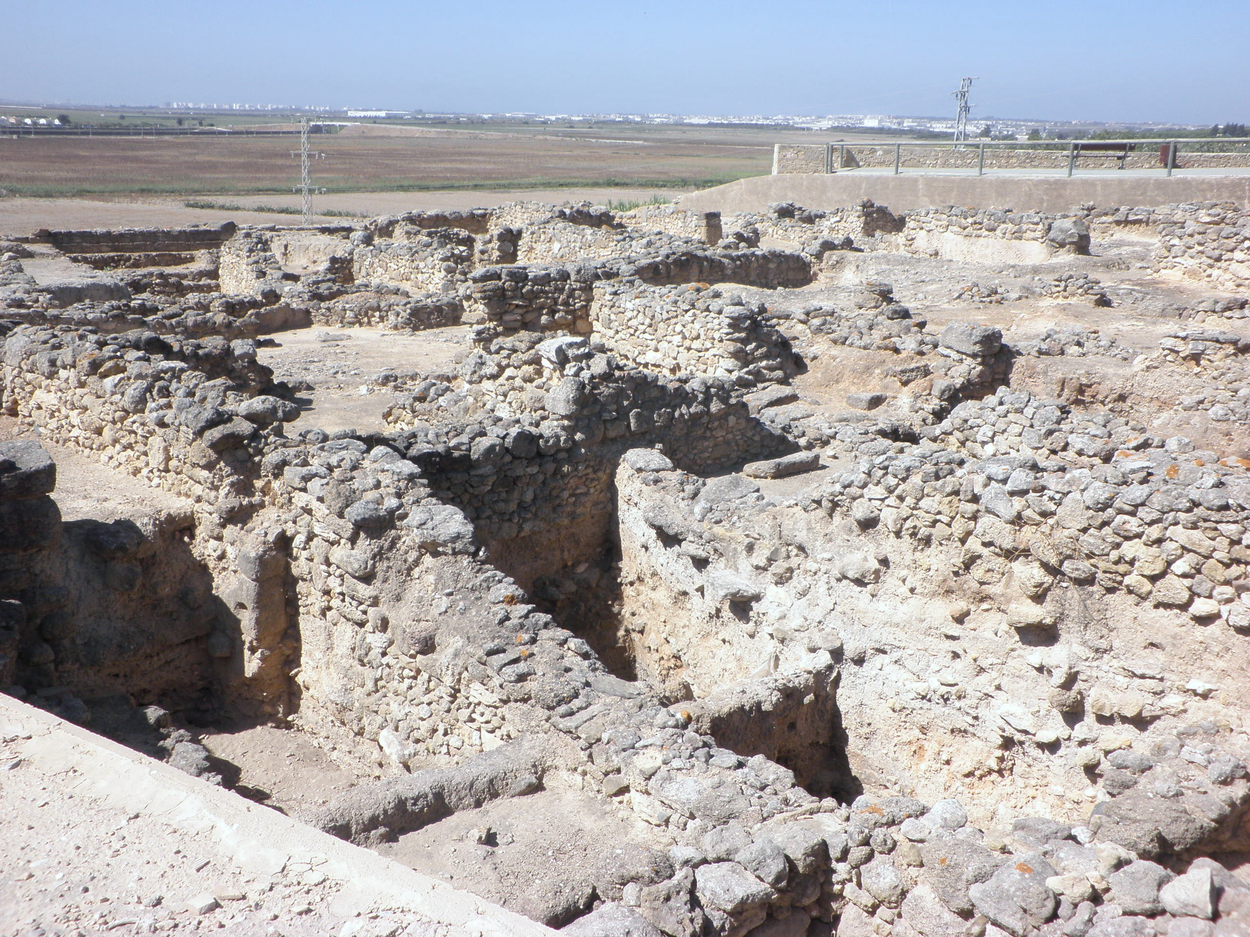 Yacimiento arqueológico de Doña Blanca, El Puerto de Santa María, España.